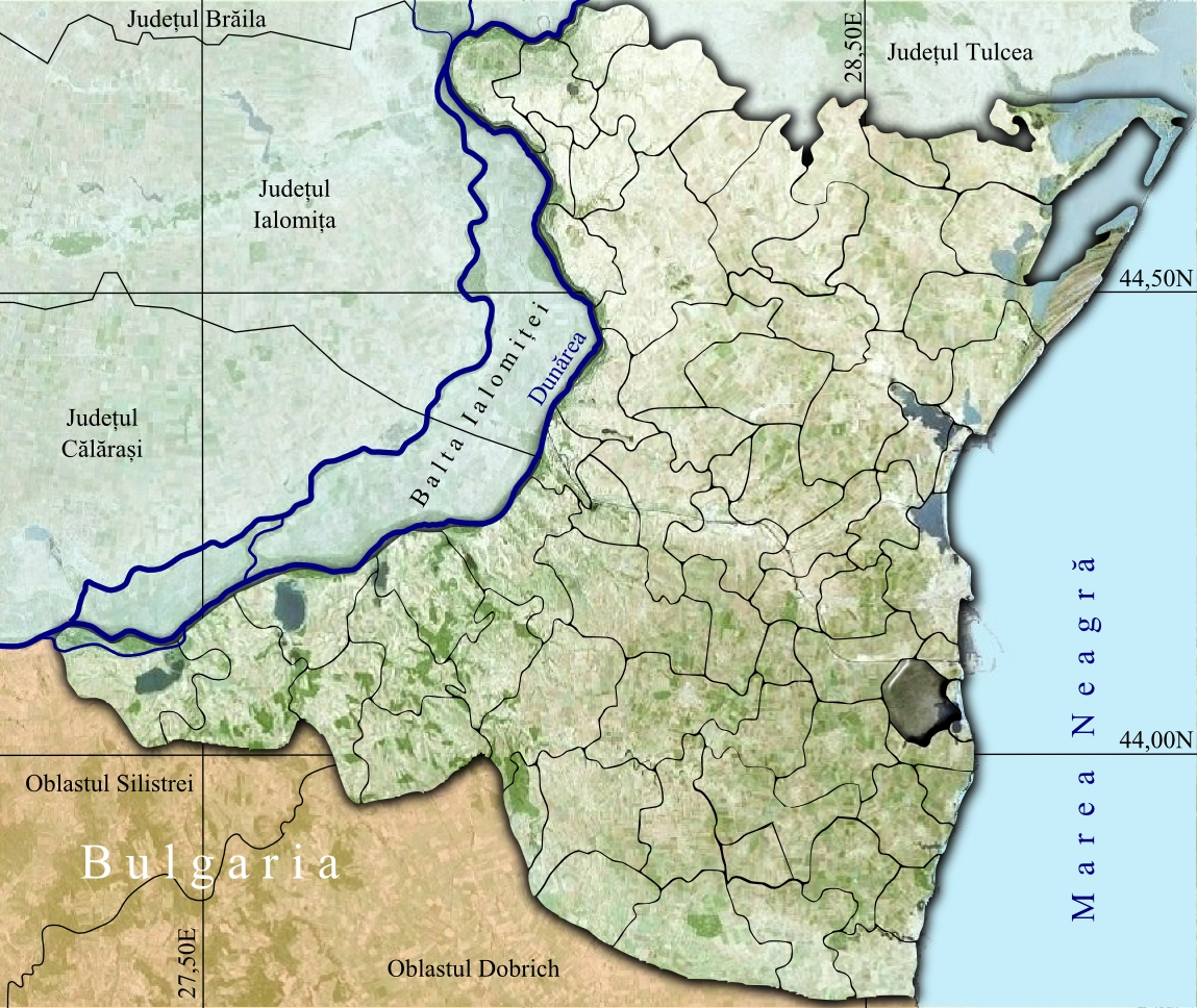 Techirghiol jud Constanta.png